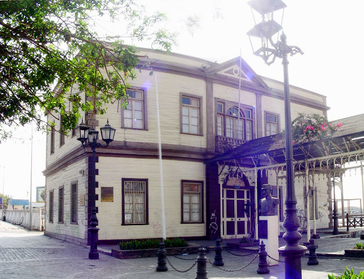 Ex Edifício de la Gobernación Marítima Edificio de la Gobernación Marítima de Antofagasta, actual sede del Museo Regional de Antofagasta. Monumento histórico nacional. Antofagasta, Chile.